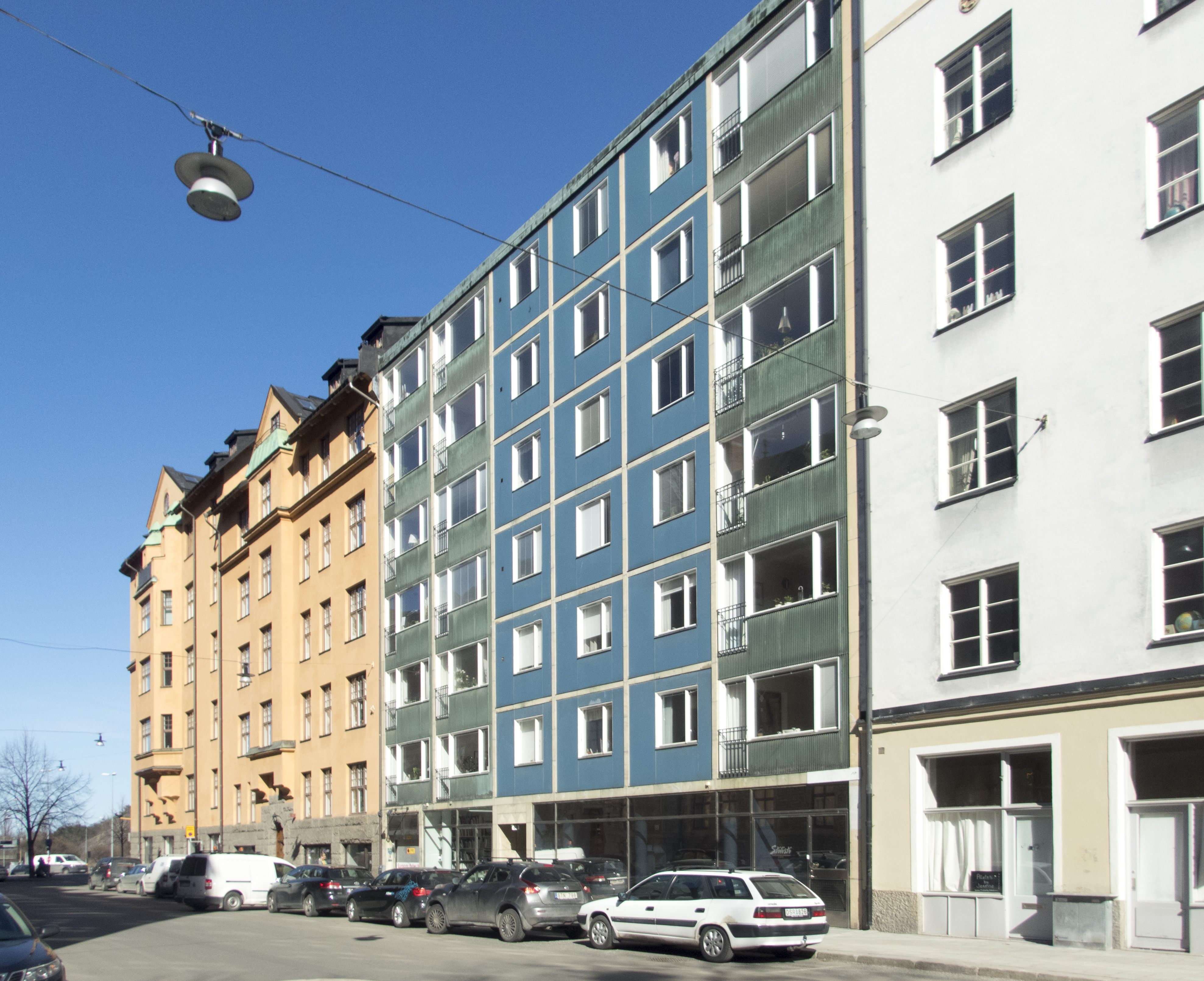 Staren 8, Roslagsgatan 60 Stockholm, Nybyggnadsår 1956 Eriksson Åke AB (Byggmästare) Olov Söderman (Arkitekt) Åke AB Eriksson (Byggherre) Åke G. Blom (Byggherre) Åke G. Blom (Byggmästare)